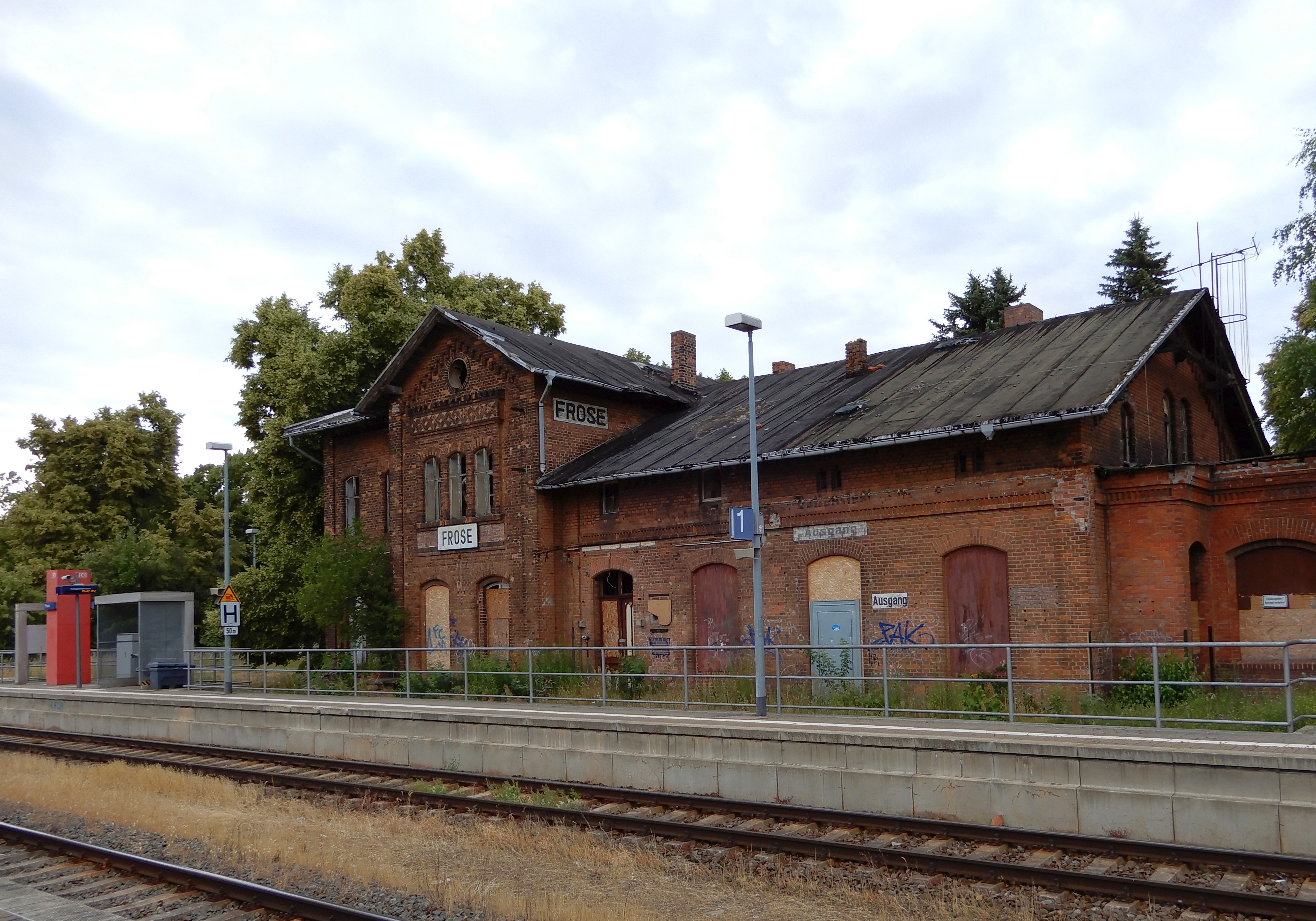 Bahnhof Frose